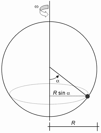 Spherical pendulum